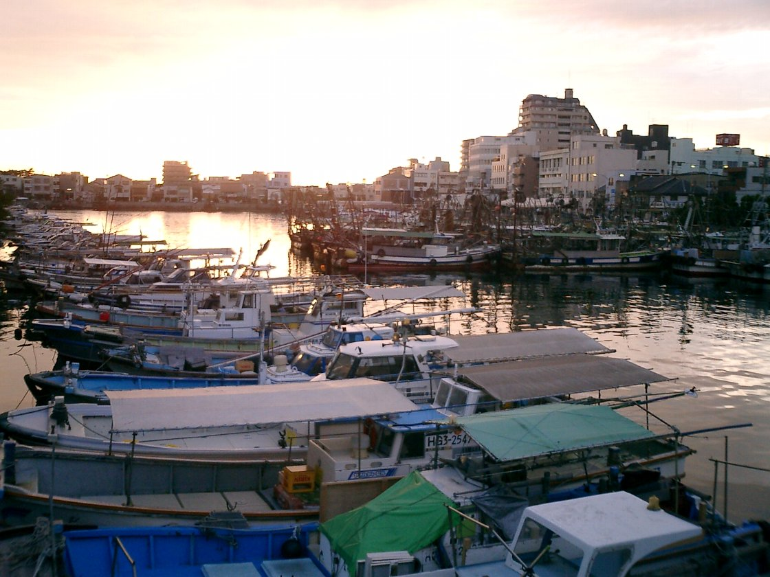 Akashi_port